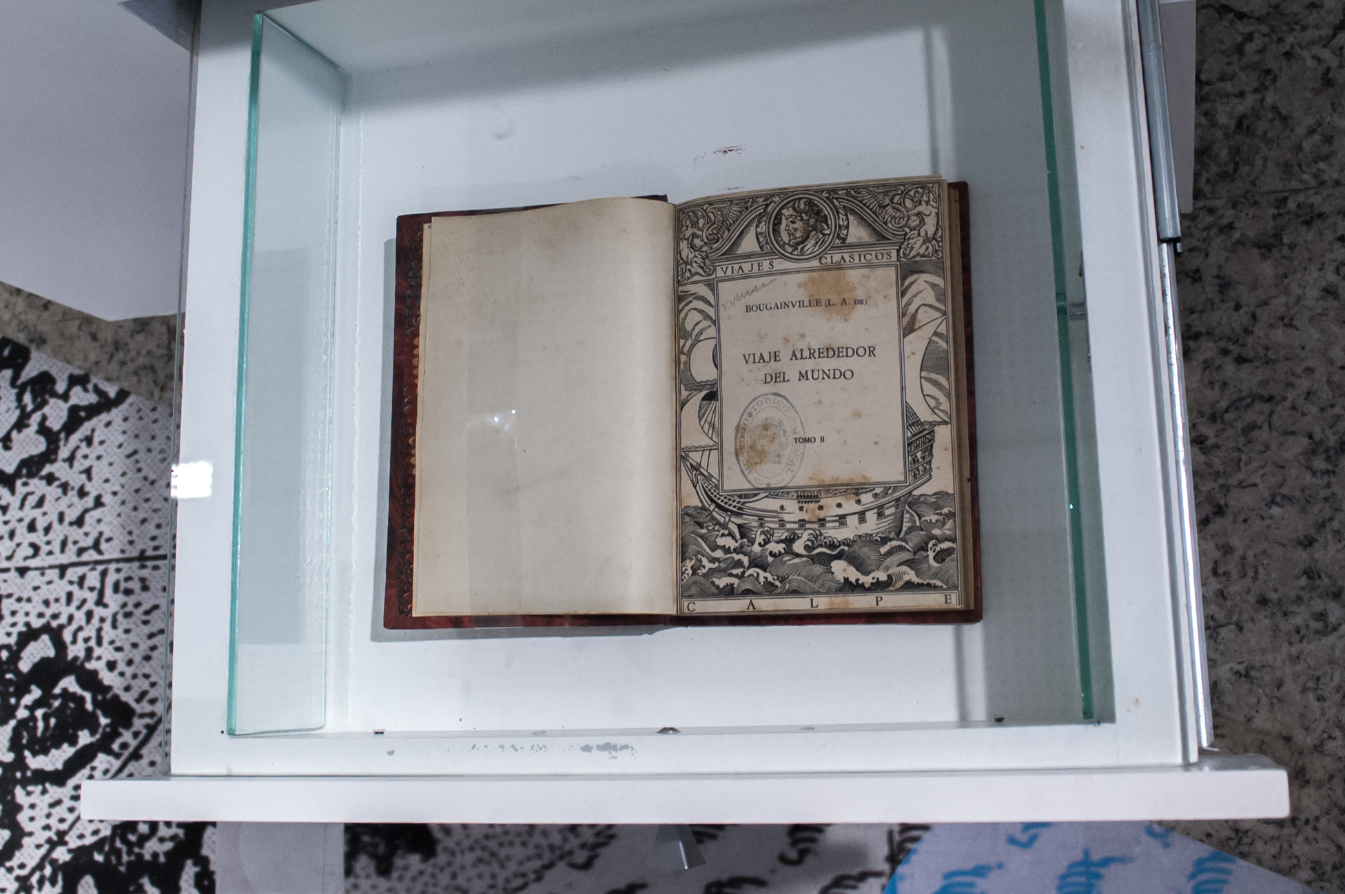 museo malvinas 030 viaje alrededor del mundo